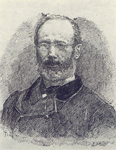 Pere Felip Monlau i Roca (1808 – 1871), doctor en medicina, higienista i humanista. Autor del projecte "Abajo las murallas", en que defensava l'enderrocament de les muralles de Barcelona com a mesura higienista, degut a les pèsimes condicions de vida